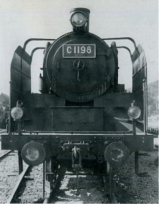 紀勢中線に新製配置されたC11 98 紀伊勝浦機関庫